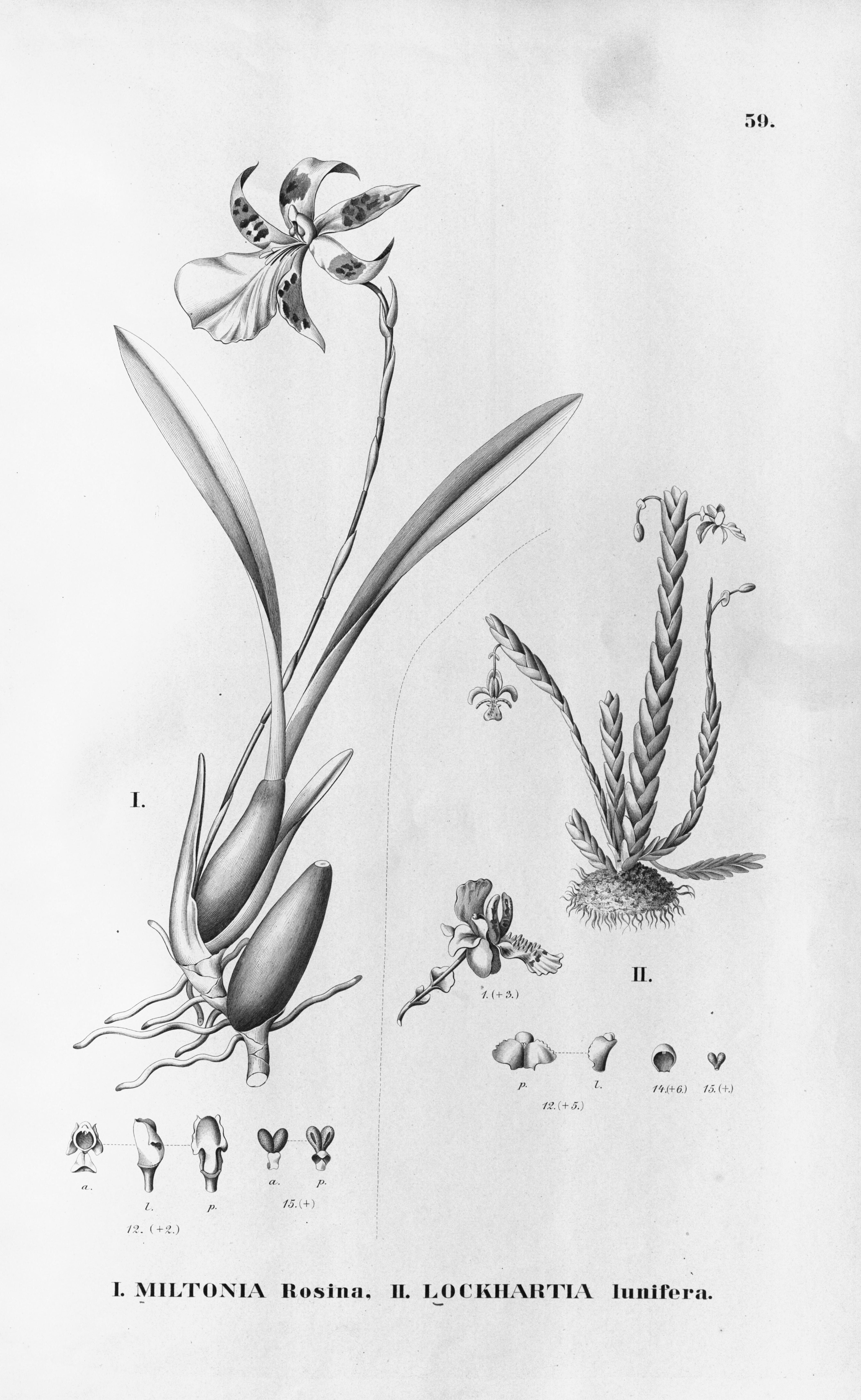 Illustration of I. Miltonia × rosina (Miltonia cuneata × Miltonia spectabilis) II. Lockhartia lunifera